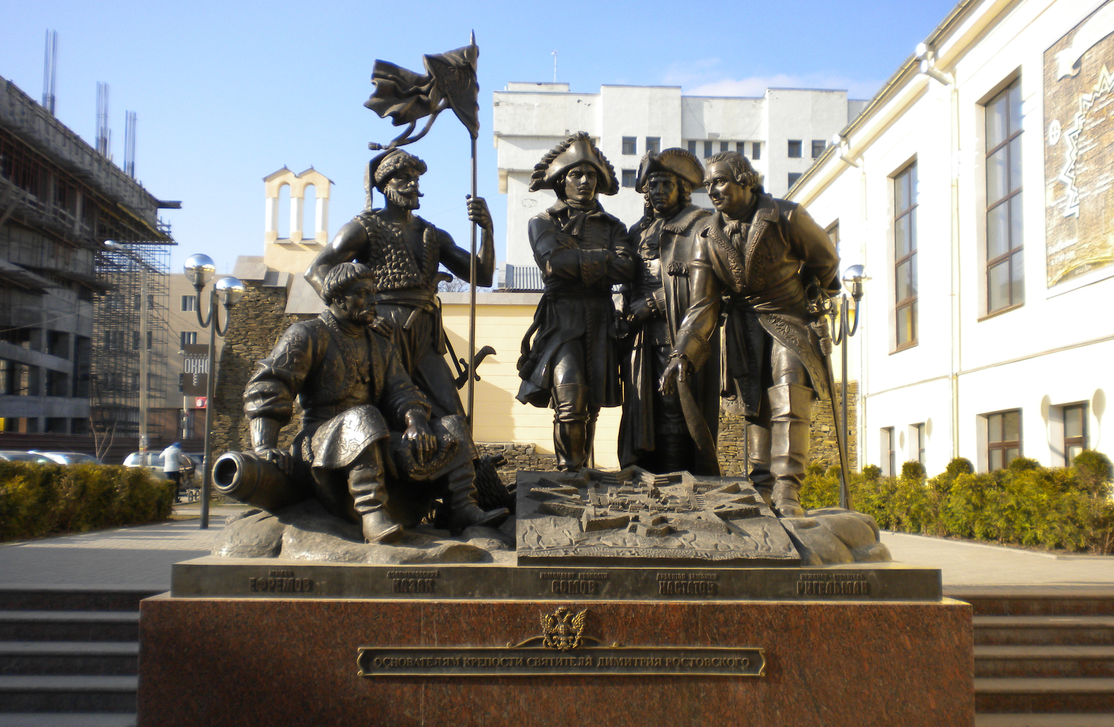 Бастион с подземными помещениями (остатки крепости Дмитрия Ростовского): улица Большая Садовая, 127, Ростов-на-Дону, Ростовская область